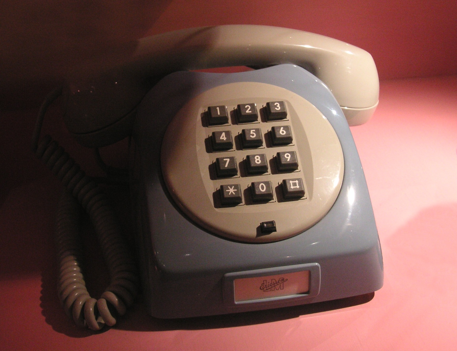 Svensk "Dialog" -telefon med knappsats från "Diavox" omkring 1970-75